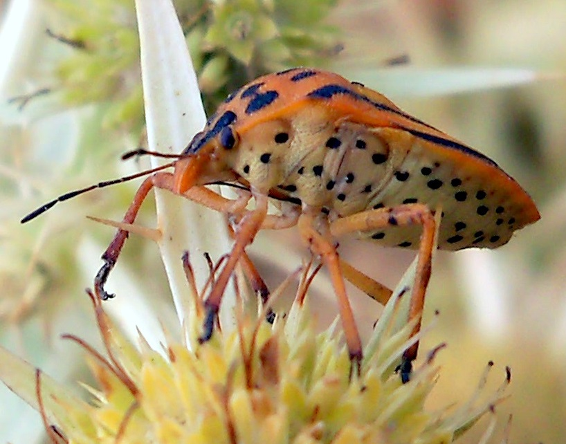 Graphosoma semipunctatum (Fabricius): vista lateral/abdominal; sur Eryngium campestre Mill. - Águilas (Murcia, España)